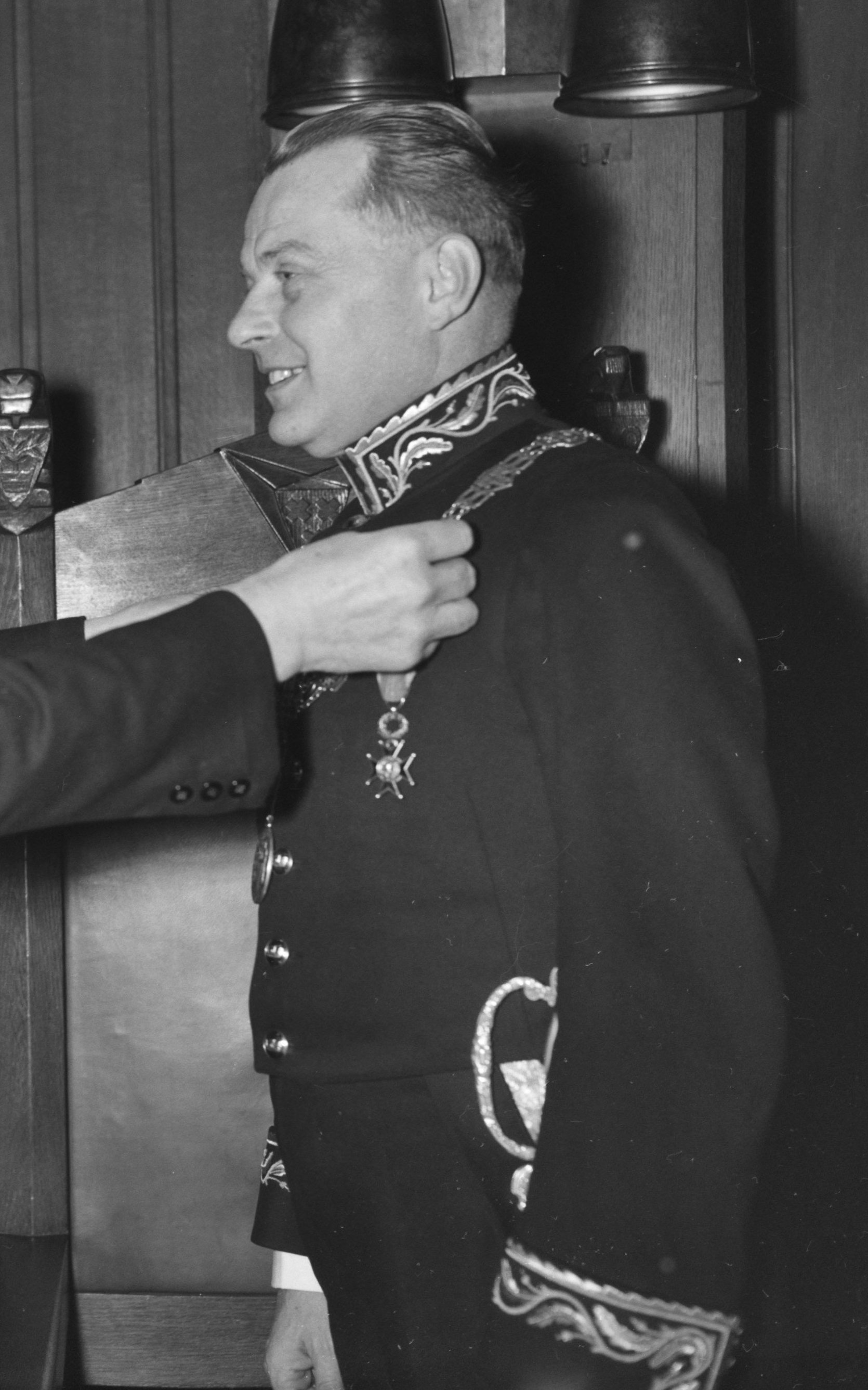 Collectie / Archief : Fotocollectie Anefo Reportage / Serie : [ onbekend ] Beschrijving : Installatie van mr. dr. R. M. A. A. Geuljans als burgemeester van Breda, locoburgemeester J. A. Meys hangt mr. dr. Geuljans de ambtsketen om Datum : 16 december 1959 Locatie : Breda Trefwoorden : Installatie, ambtsketens, burgemeesters, locoburgemeesters Persoonsnaam : J. A. Meys, mr. dr. Geuljans Fotograaf : Bilsen, Joop van / Anefo Auteursrechthebbende : Nationaal Archief Materiaalsoort : Negatief (zwart/wit) Nummer archiefinventaris : bekijk toegang 2.24.01.04 Bestanddeelnummer : 910-8842